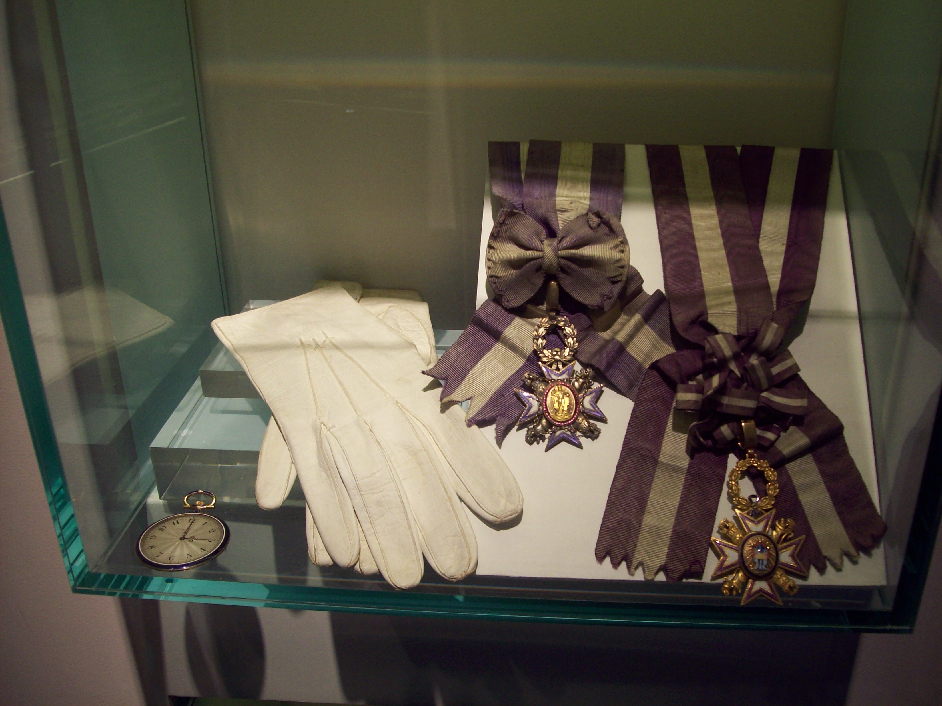 Orden de María Luisa otorgada por el gobierno español a la esposa del presidente José Figueroa Alcorta por el Centenario argentino. Los guantes blancos y el reloj pertenecen al presidente Manuel Quintana.